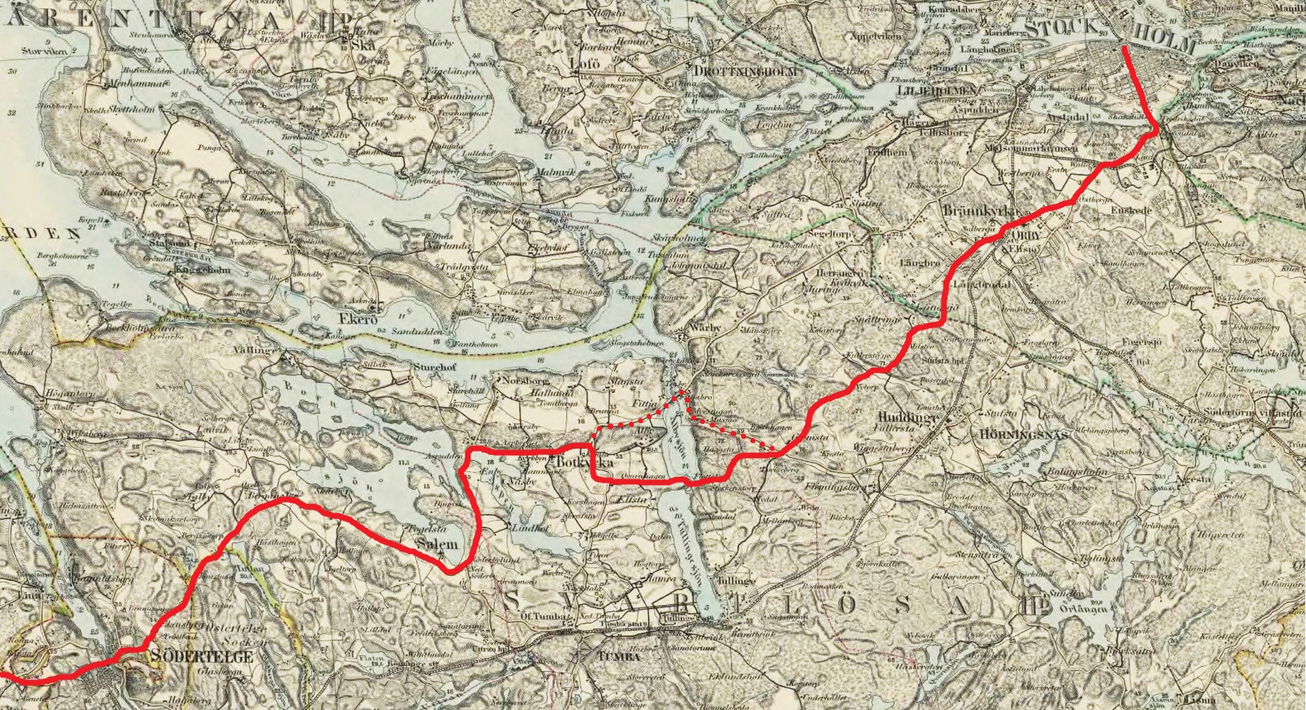 Göta landsvägs sträckning på Generalstabskartan från 1873